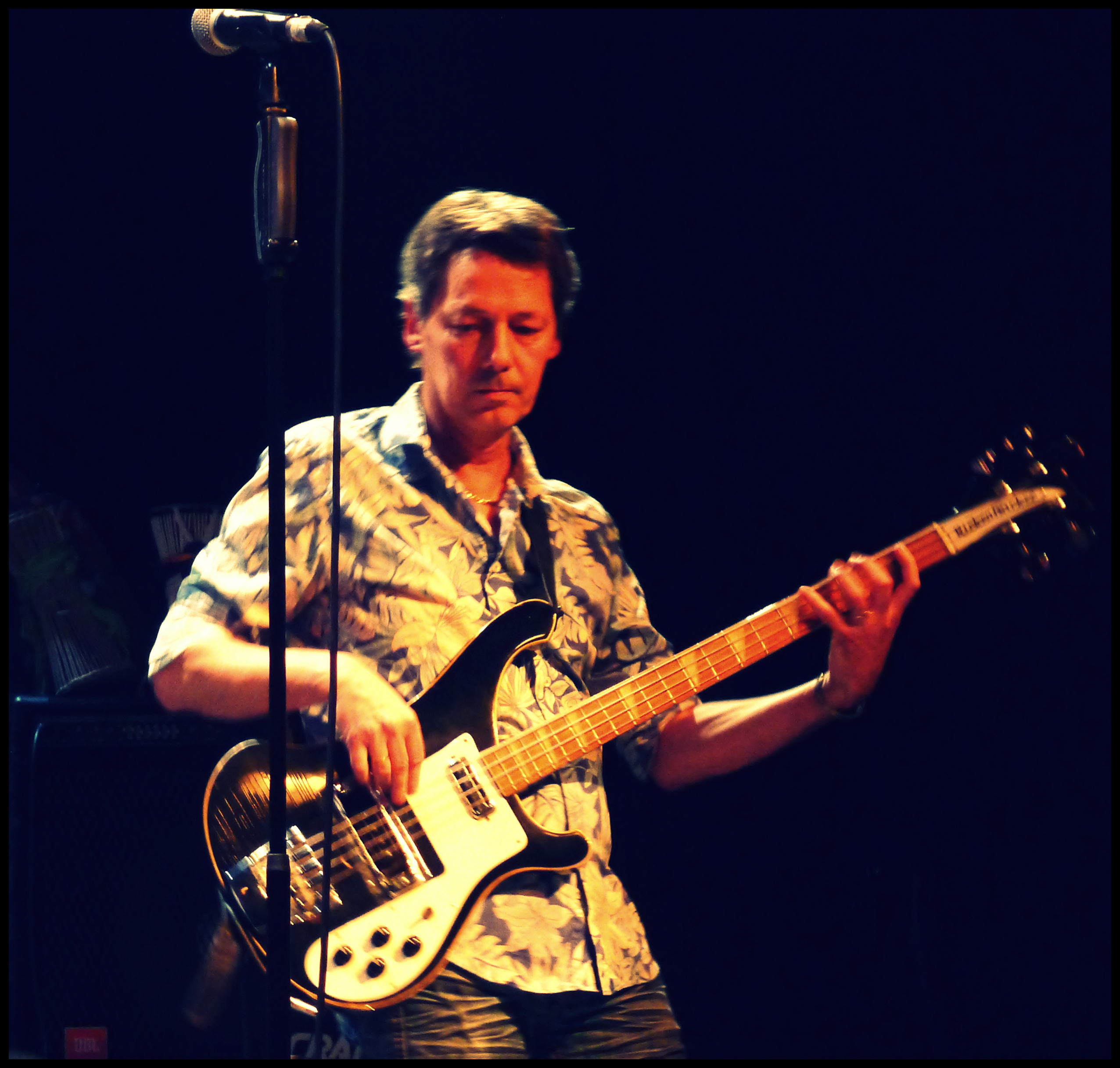 Hubert Dupont, contrebassiste et bassiste de jazz